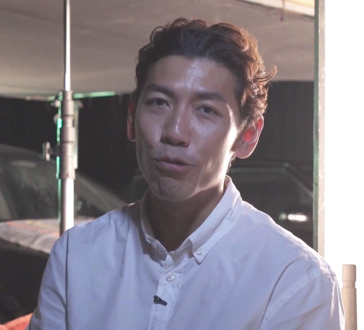 ป๋อมแป๋ม